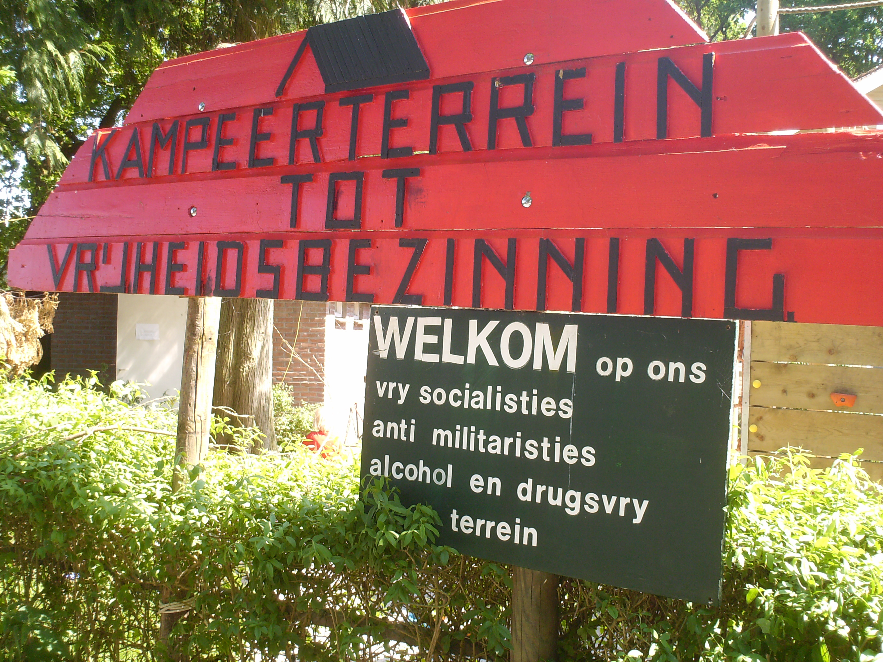 Welkomstbord bij vrij-socialistische camping 'Tot Vrijheidsbezinning' in Appelscha, Friesland, Nederland